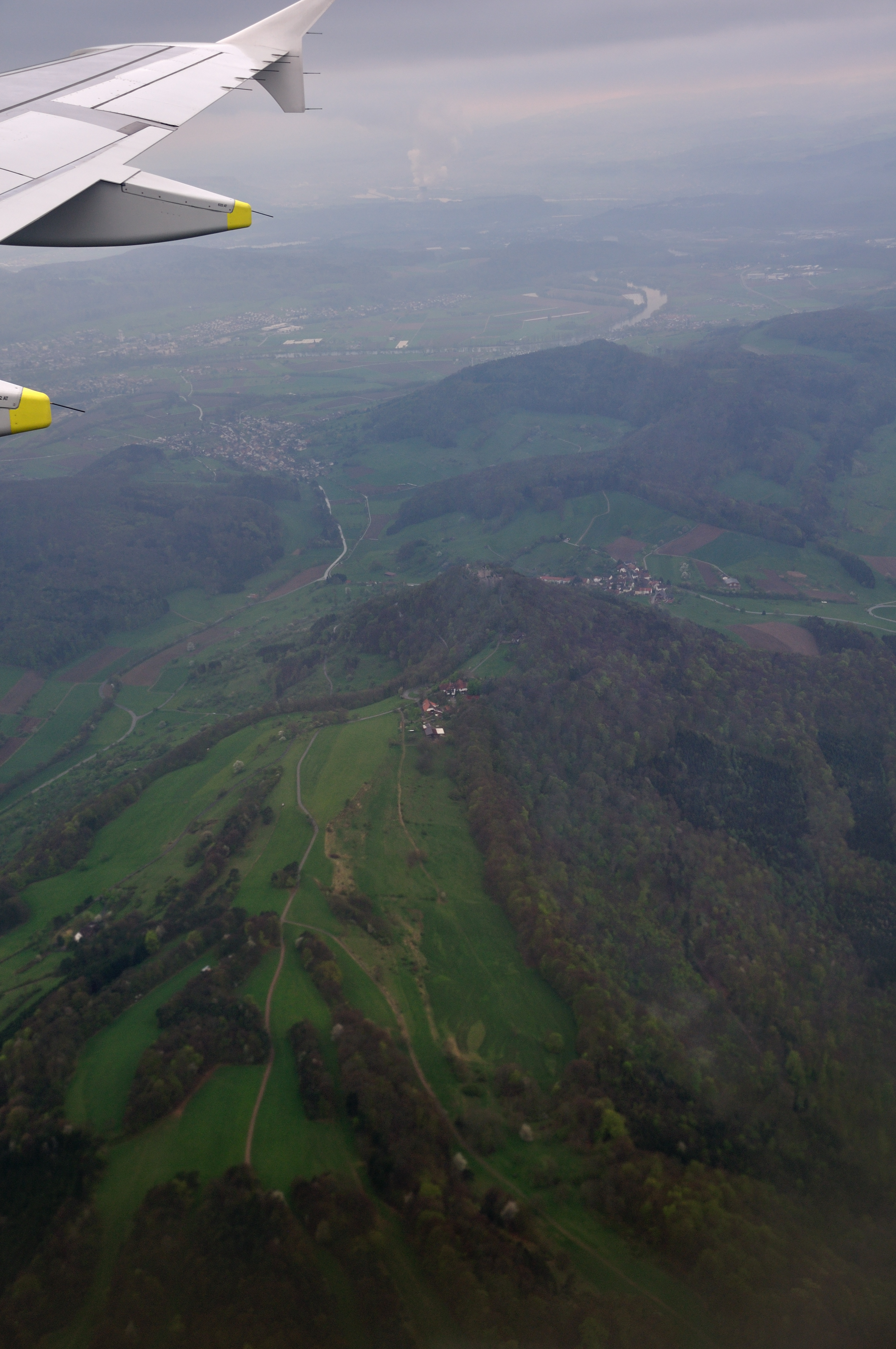 Germany, Baden-Württemberg Küssaburg